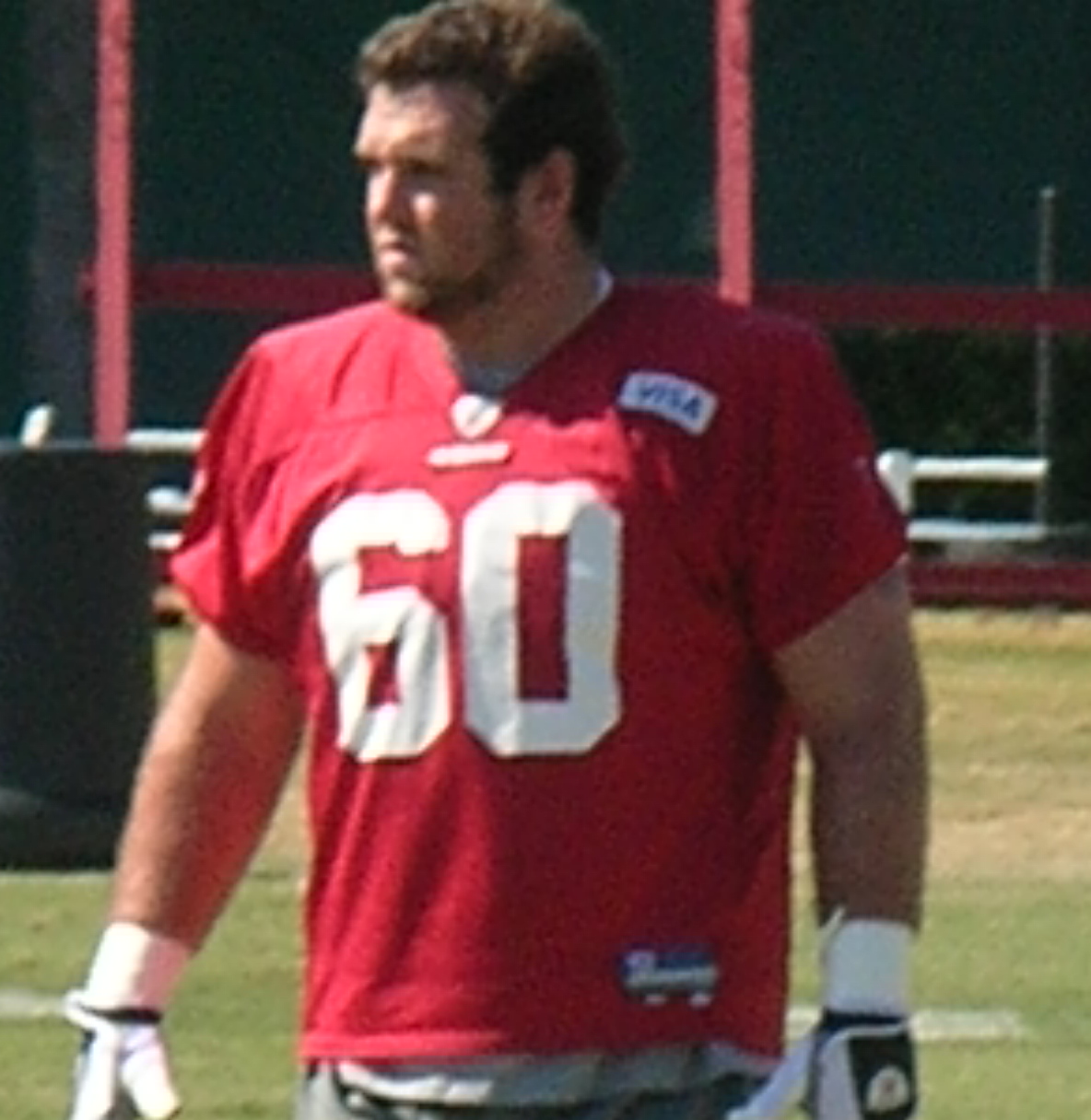 San Francisco 49ers guard Brian de la Puente at training camp in Santa Clara, California.